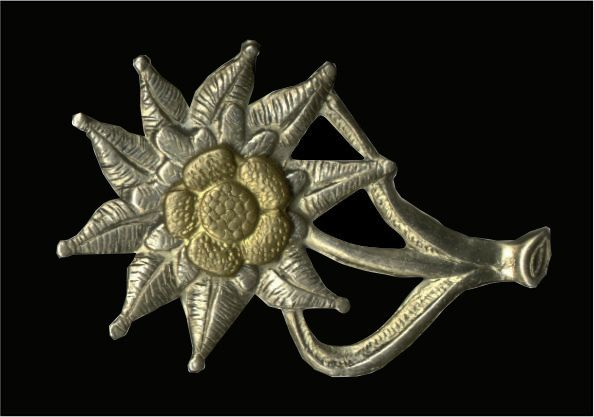 WZÓR GRAFICZNY PROPORCZYKA NA BERET 1. BATALIONU CZOŁGÓW